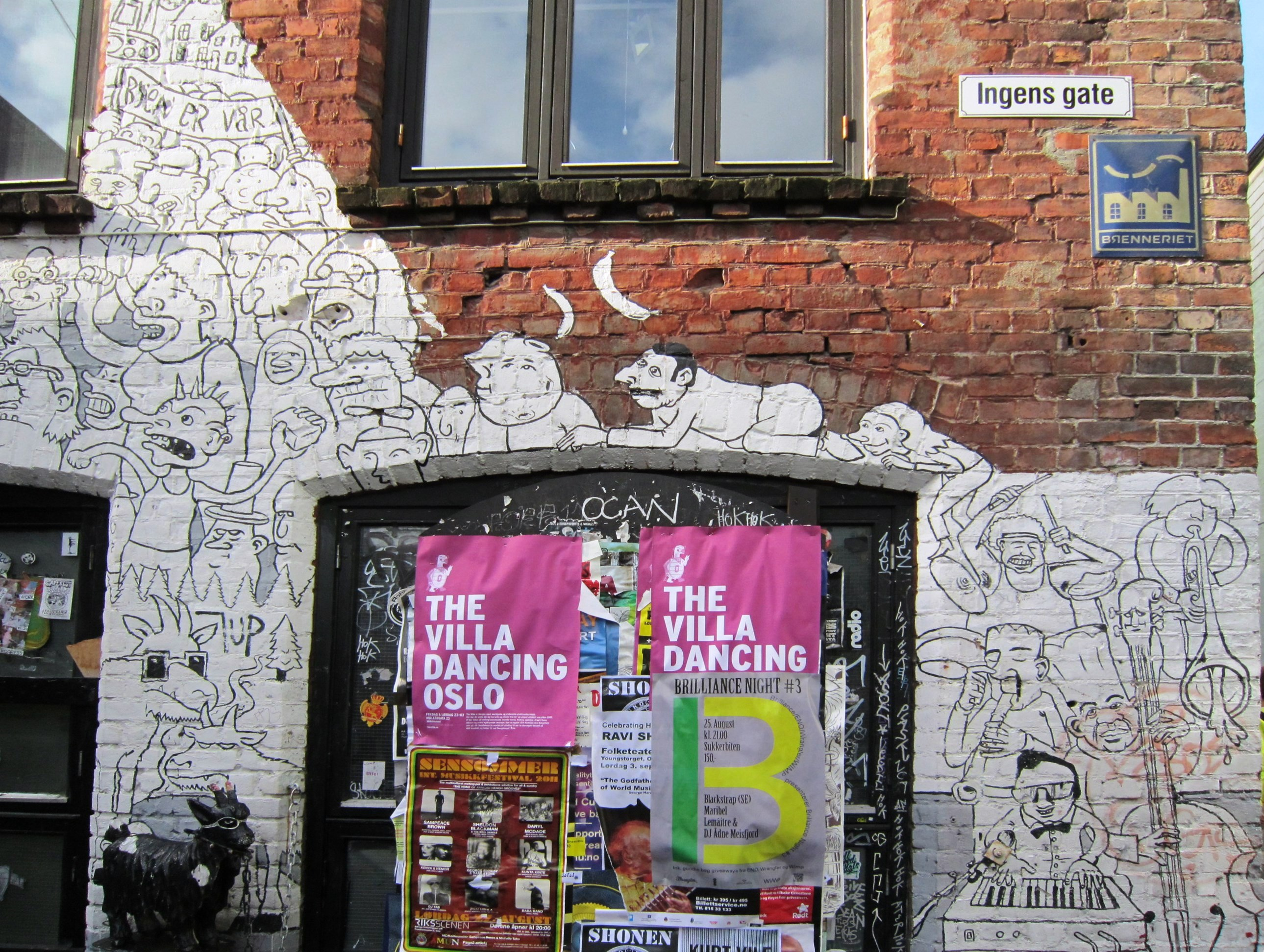 Ingens gate, (uoffisiell?) sidegate til Brenneriveien i Oslo